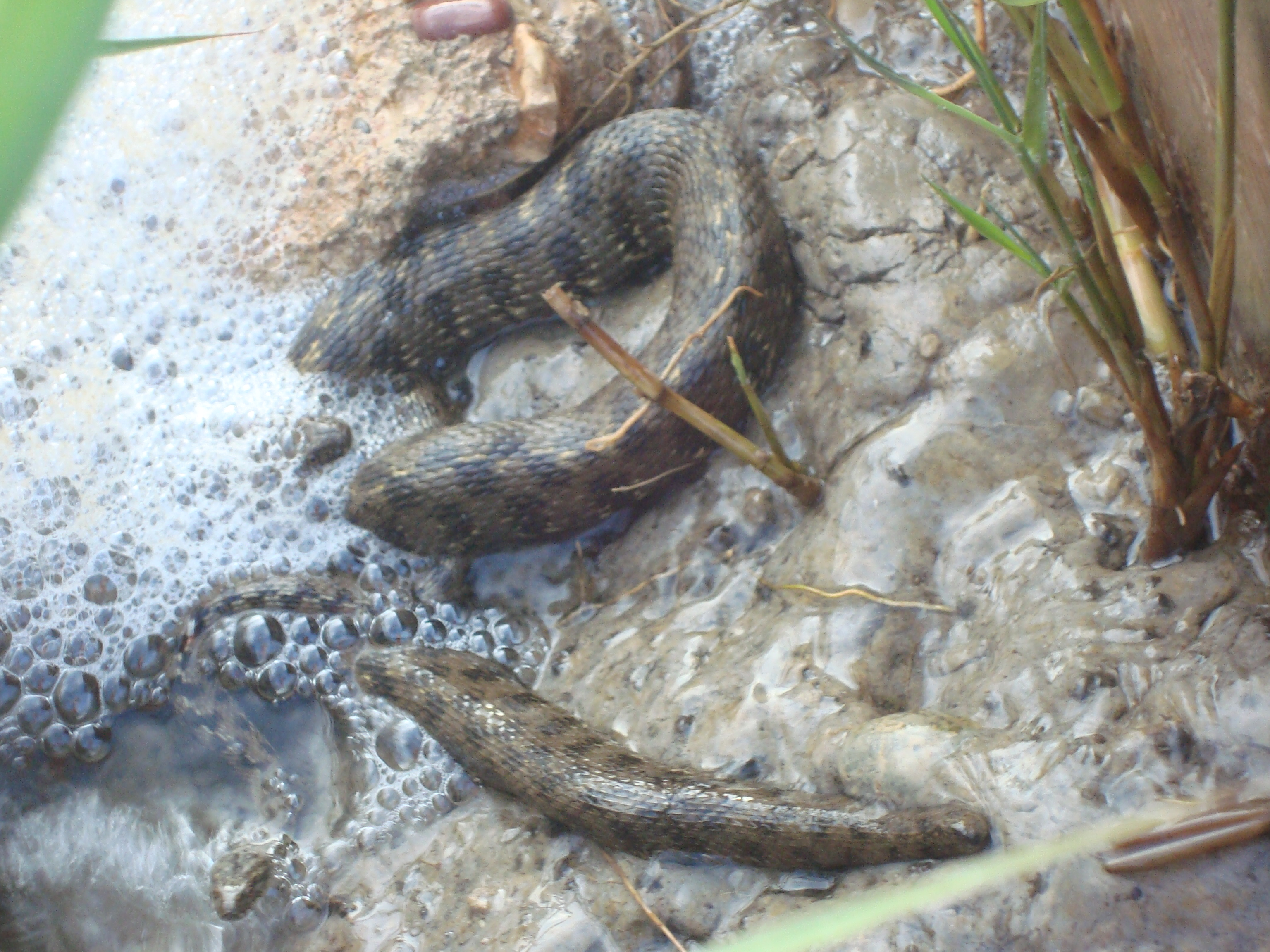 Serpientes de agua del Prat de Cabanes-Torreblanca